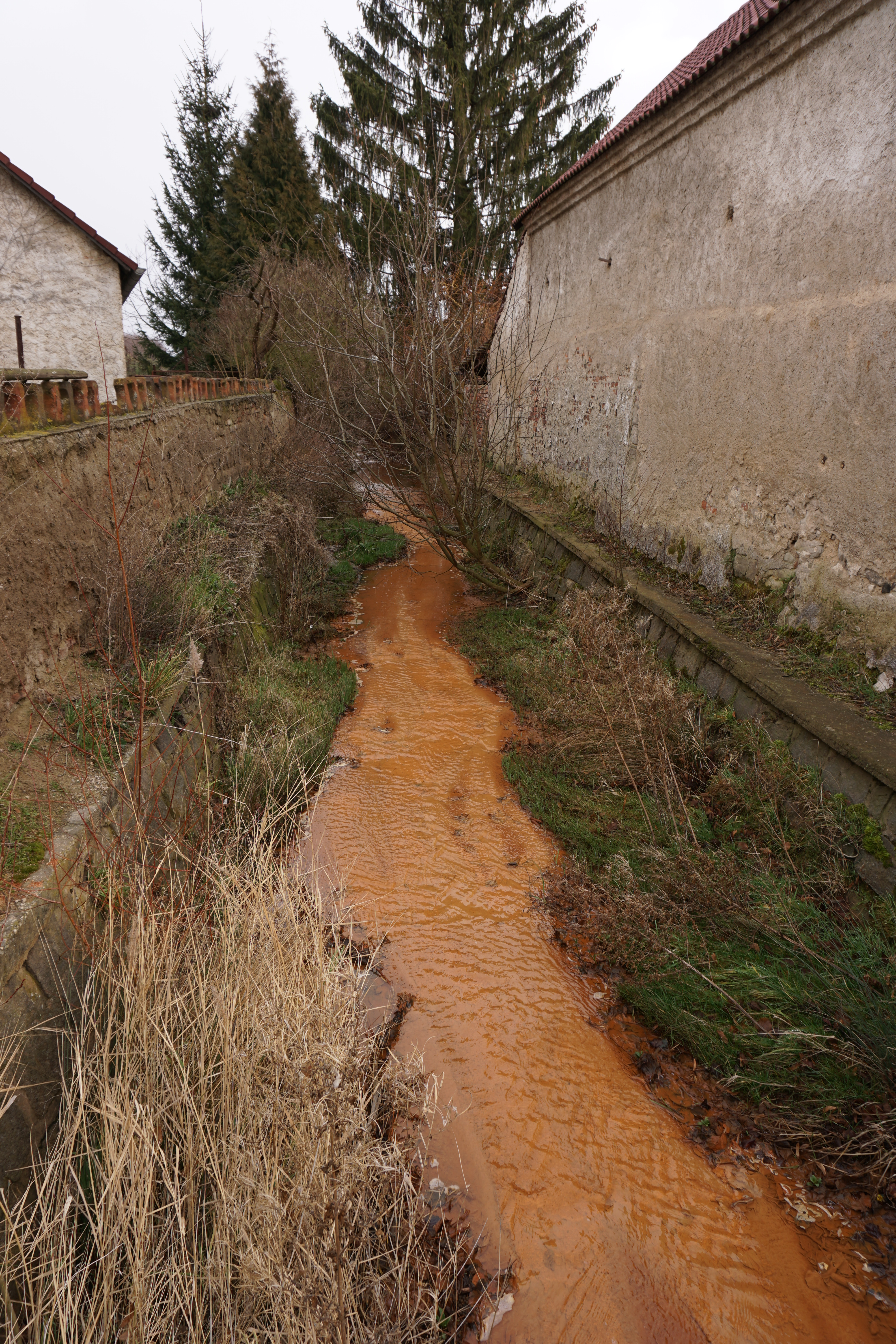 Byseň - Byseňský potok východně od mostku, mezi čp. 19 a 17